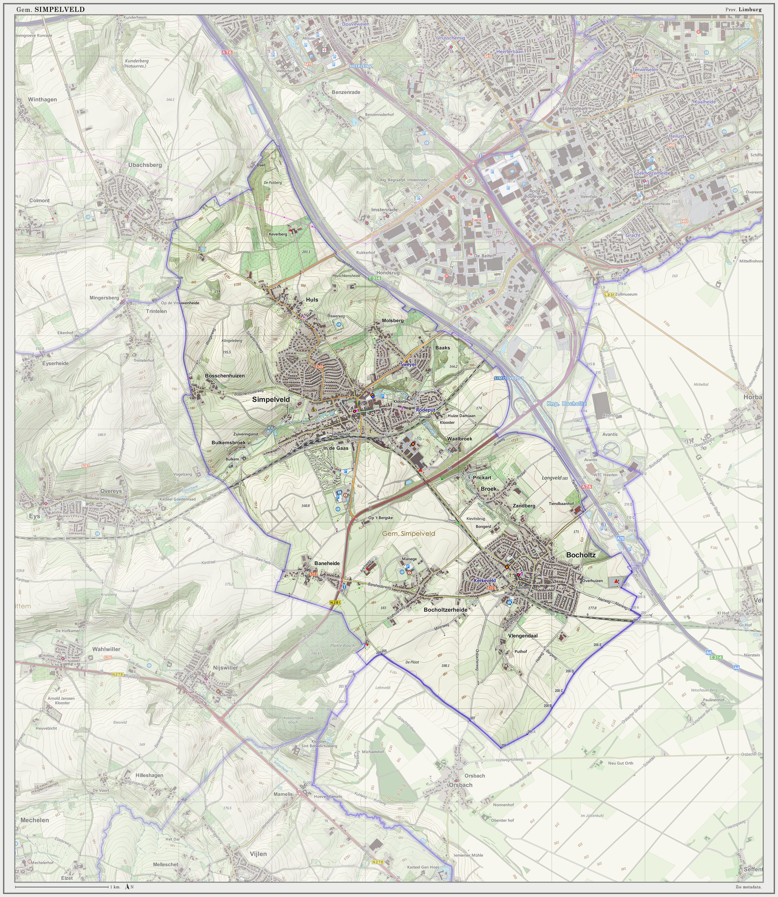 Topografische kaart van (gemeente) per maart 2014. Resolutie: 300 pixels/km. Kaartbeeld samengesteld uit de open geodata van de Top10NL en Top25namen (Basisregistratie Topografie, Kadaster 28-feb-2014), Creative Commons BY licentie. Gebouwvlakken uit open geodata BAG extract (8-mrt-2014). Wegen uit de OpenStreetMap (8-mrt-2014), OpenStreetMap community. Schaduwreliëf uit de Actuele Hoogtekaart AHN2 (8-mrt-2014). Samenstelling en kleurenschema: Jan-Willem van Aalst, met QGIS2. Zie ook de Legenda.